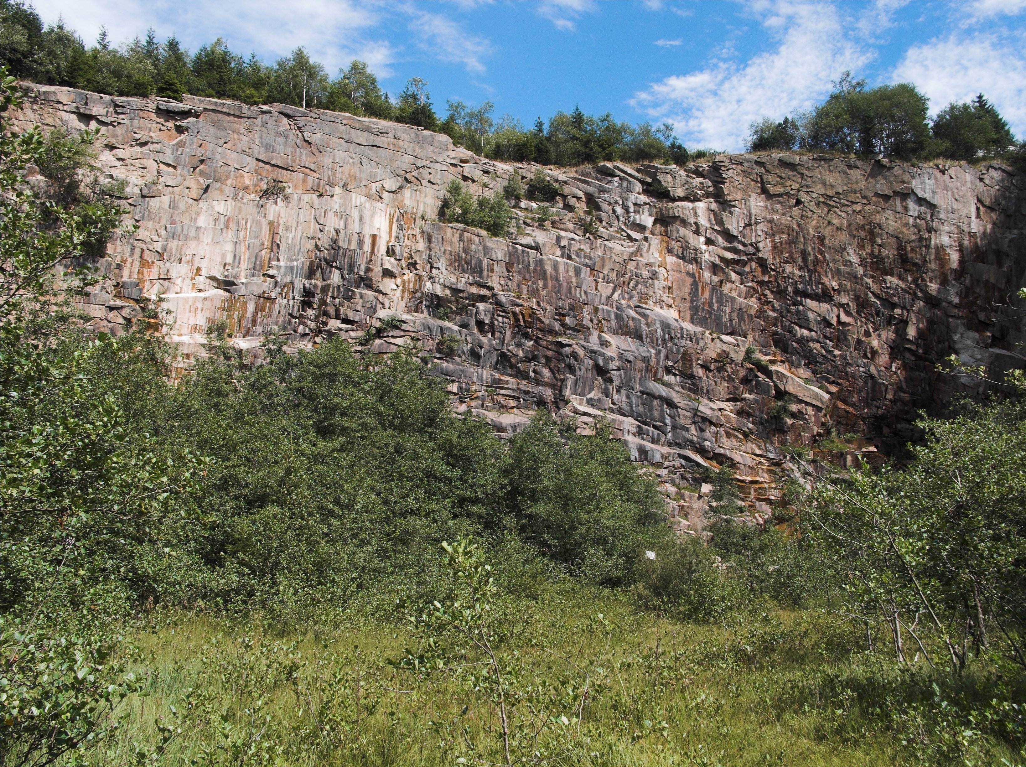 Wurmberg-Granitsteinbruch